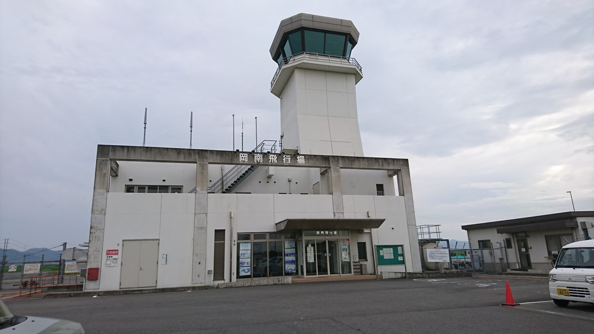 岡南飛行場管制塔